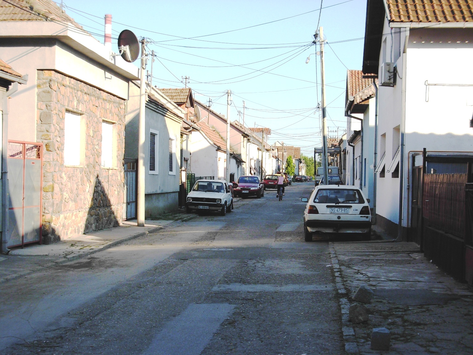 VI ulica u naselju Šangaj, Novi Sad.